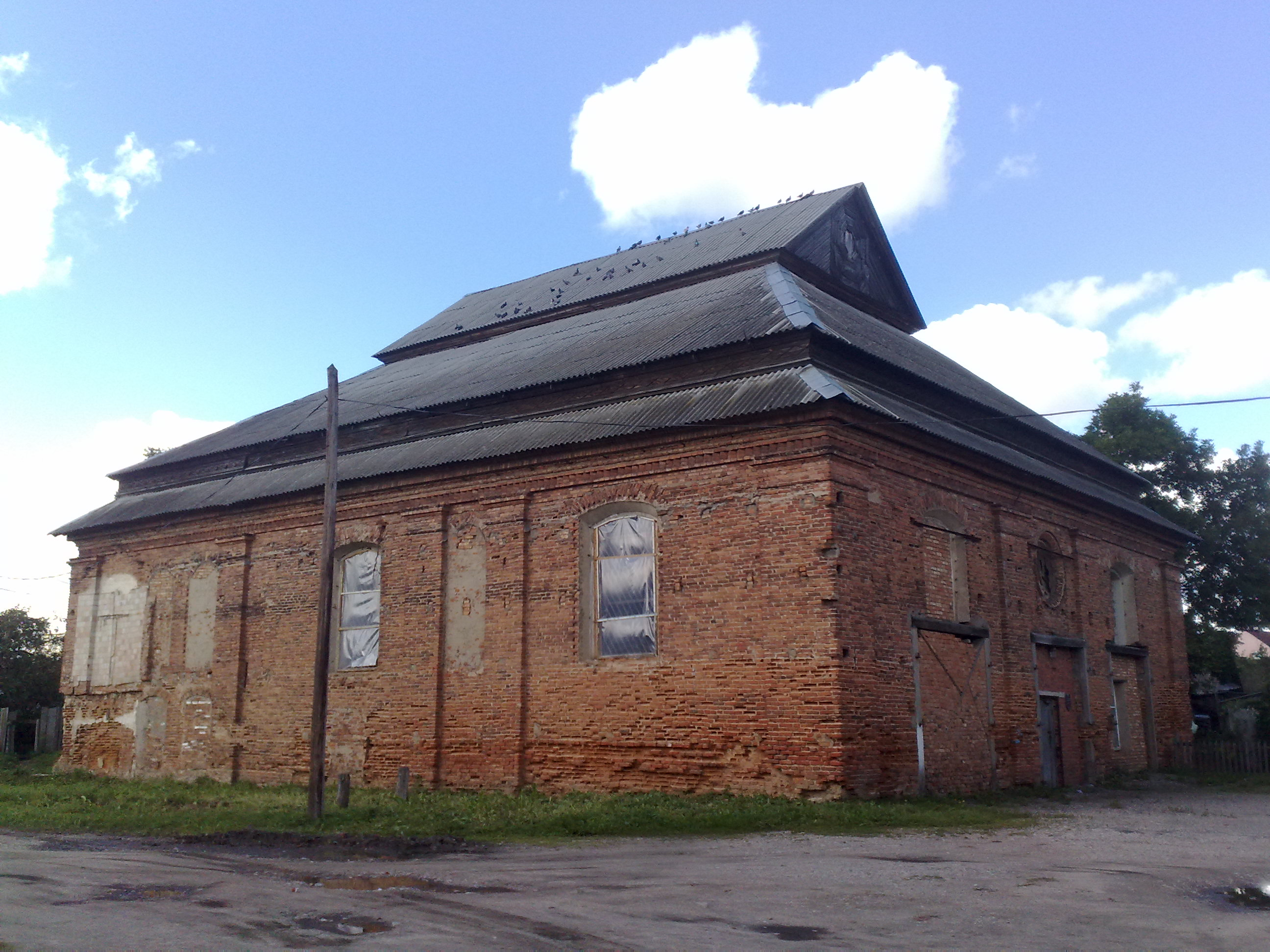 Synagogue in Asmyany